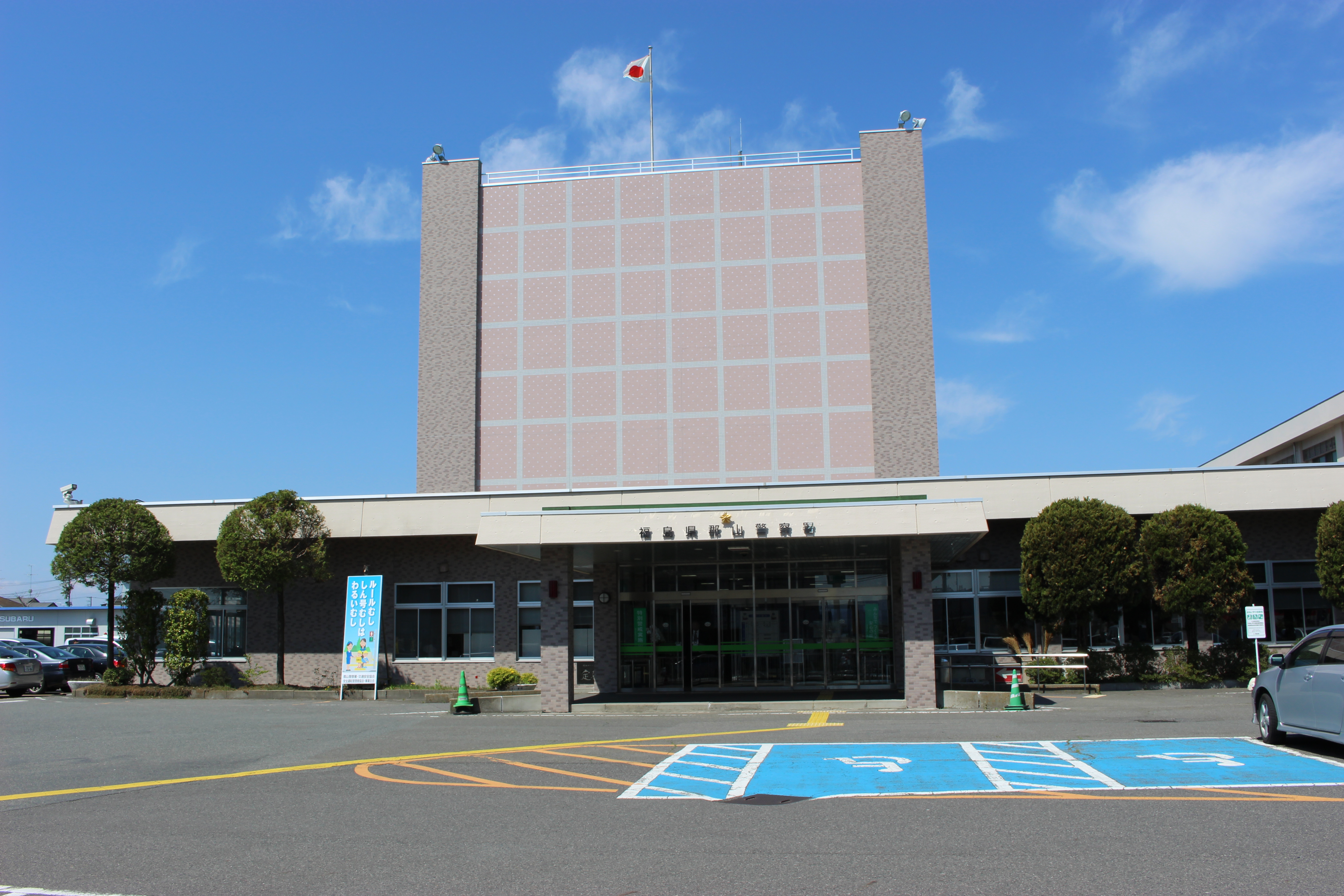 郡山警察署（福島県郡山市）